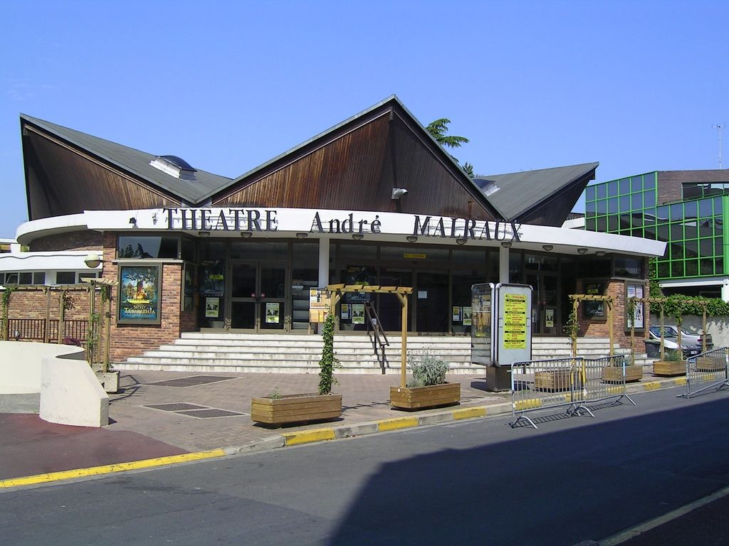 Théâtre et cinéma André Malraux, rue Guillemeteau Photo personnelle (own work) de Marianna